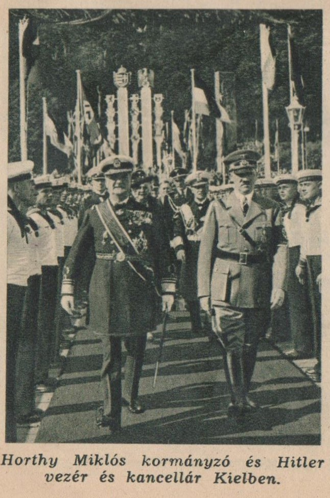 Horthy és Hitler Kielben